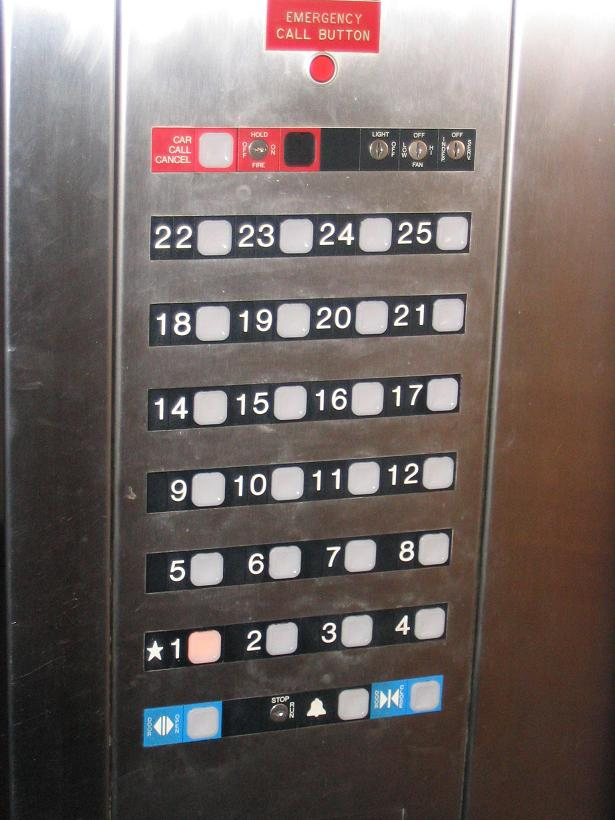 Elevator buttons